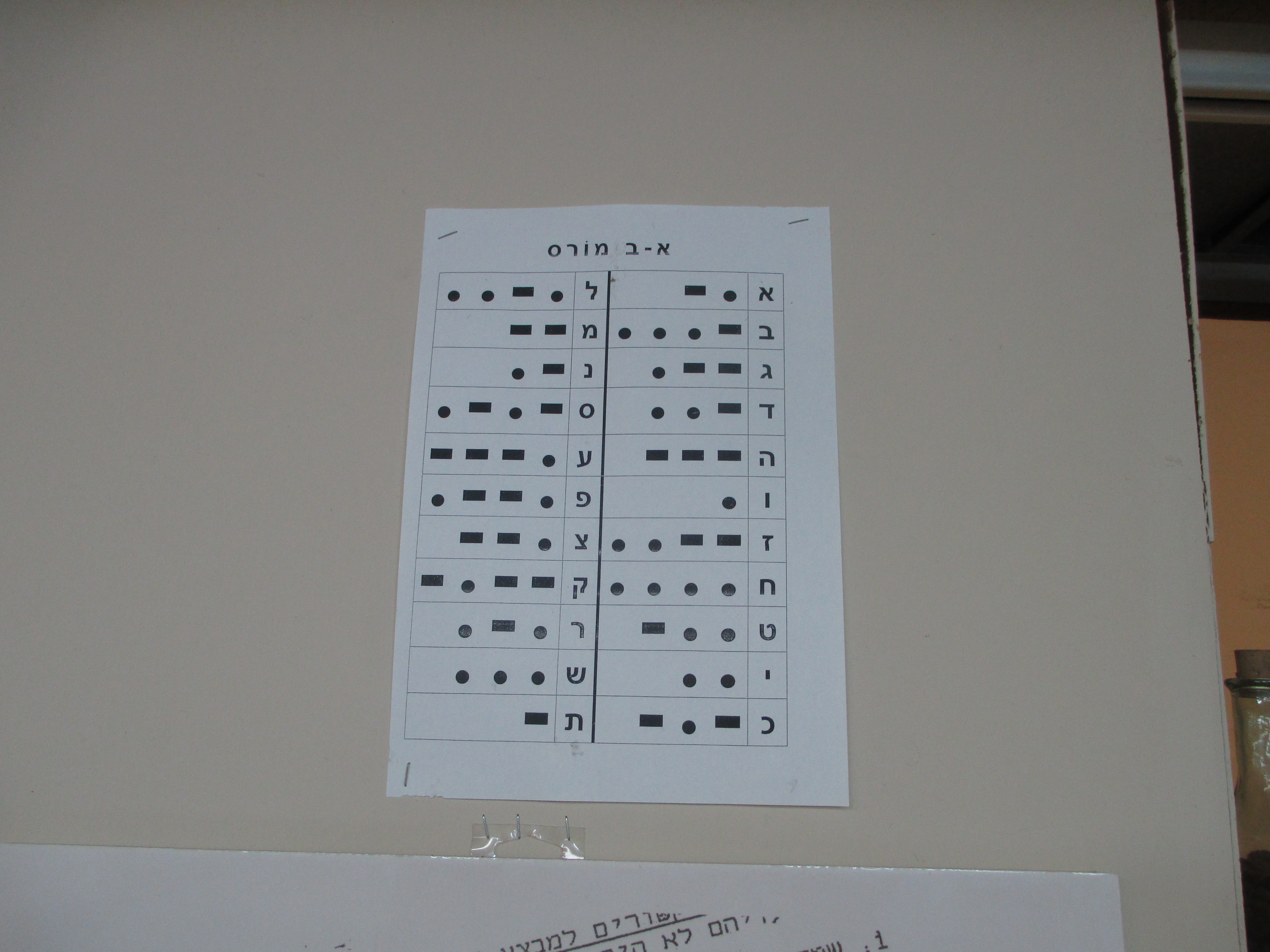 תחנת שרה בקיבוץ גבת - קוד מורס בעברית